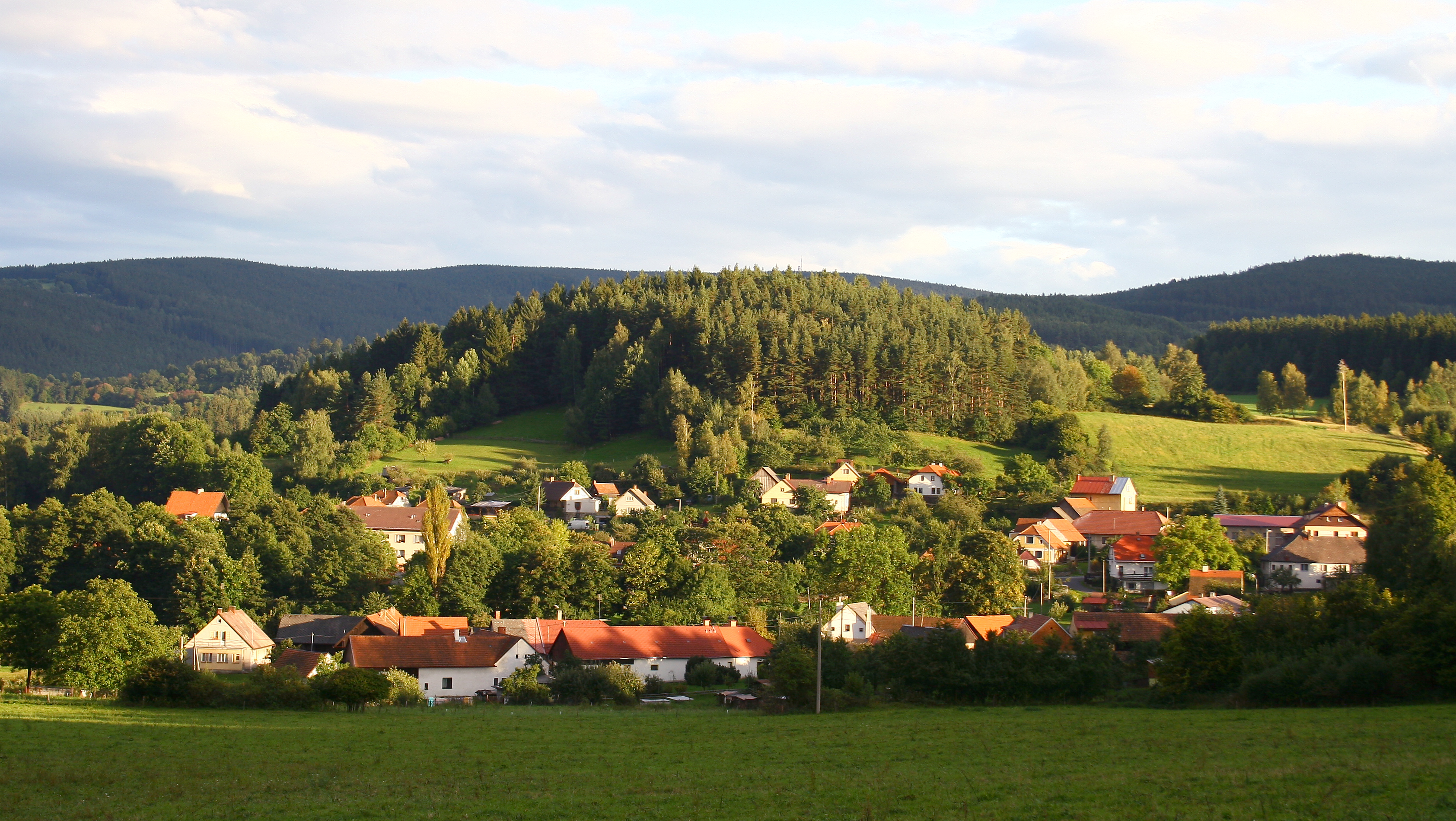 Dolní část vesnice Nezdic na Šumavě nedaleko Kašperských Hor. Okres Klatovy, Plzeňský kraj, Česká republika.